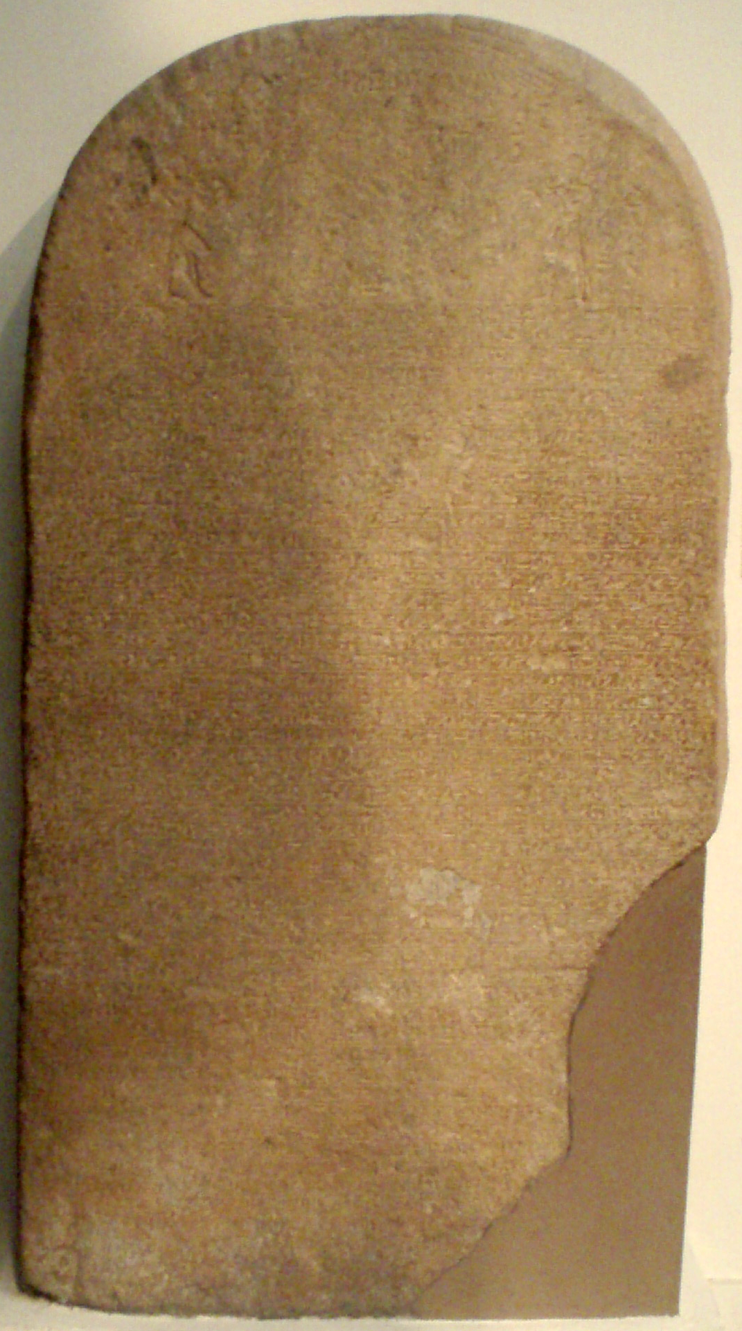 Victory stela of pharaoh Thutmose III, from Jebel Barkal, temple of Amen. Made of granite, from the 18th dynasty, circa 1490-1436 B.C. Erected during his 47th regnal year (roughly 1443 B.C.) marking his kingdom's southern boundary. 50 lines of hieroglyphs mark his campaigns in Naharin, the Battle of Megiddo, an elephant hunt, a royal speech, and more. Now residing in the Museum of Fine Arts, Boston. Details